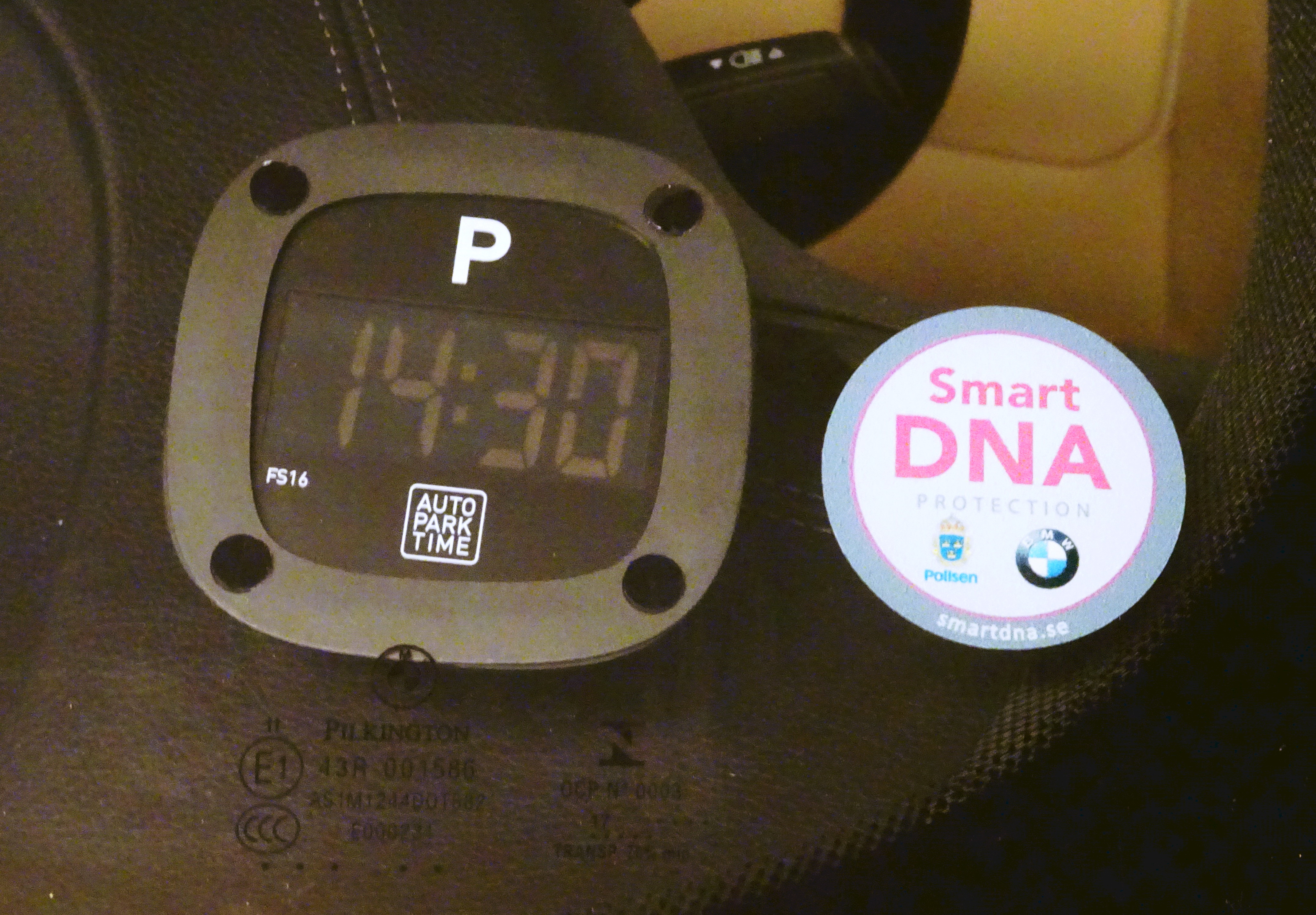 Automatisk p-skiva, gäller bara i vissa länder